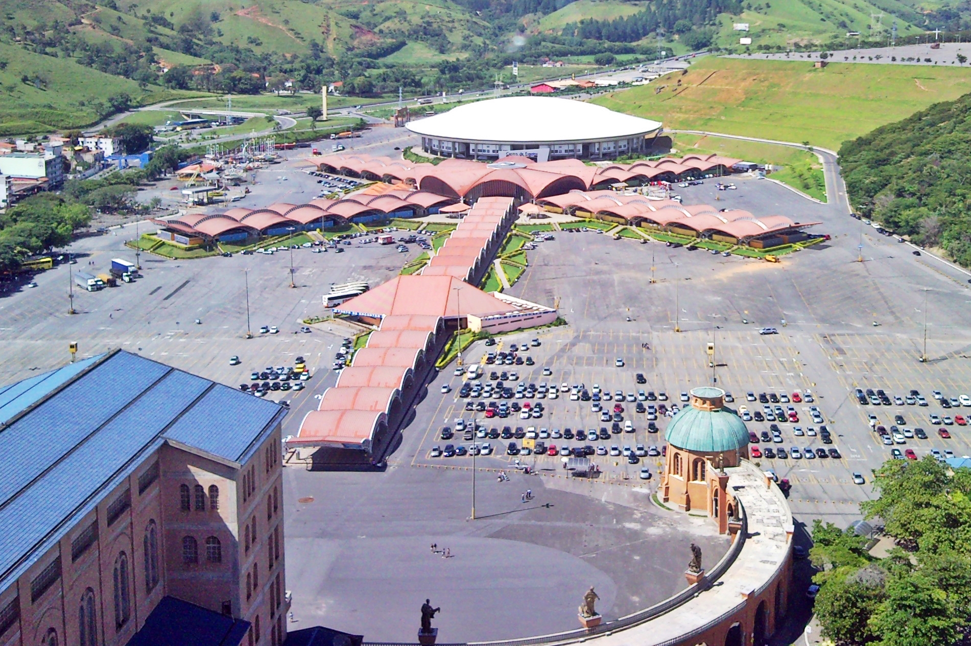 Vistas para o Centro Comercial da Basílica em Aparecida SP, foto tirada da torre da Basílica